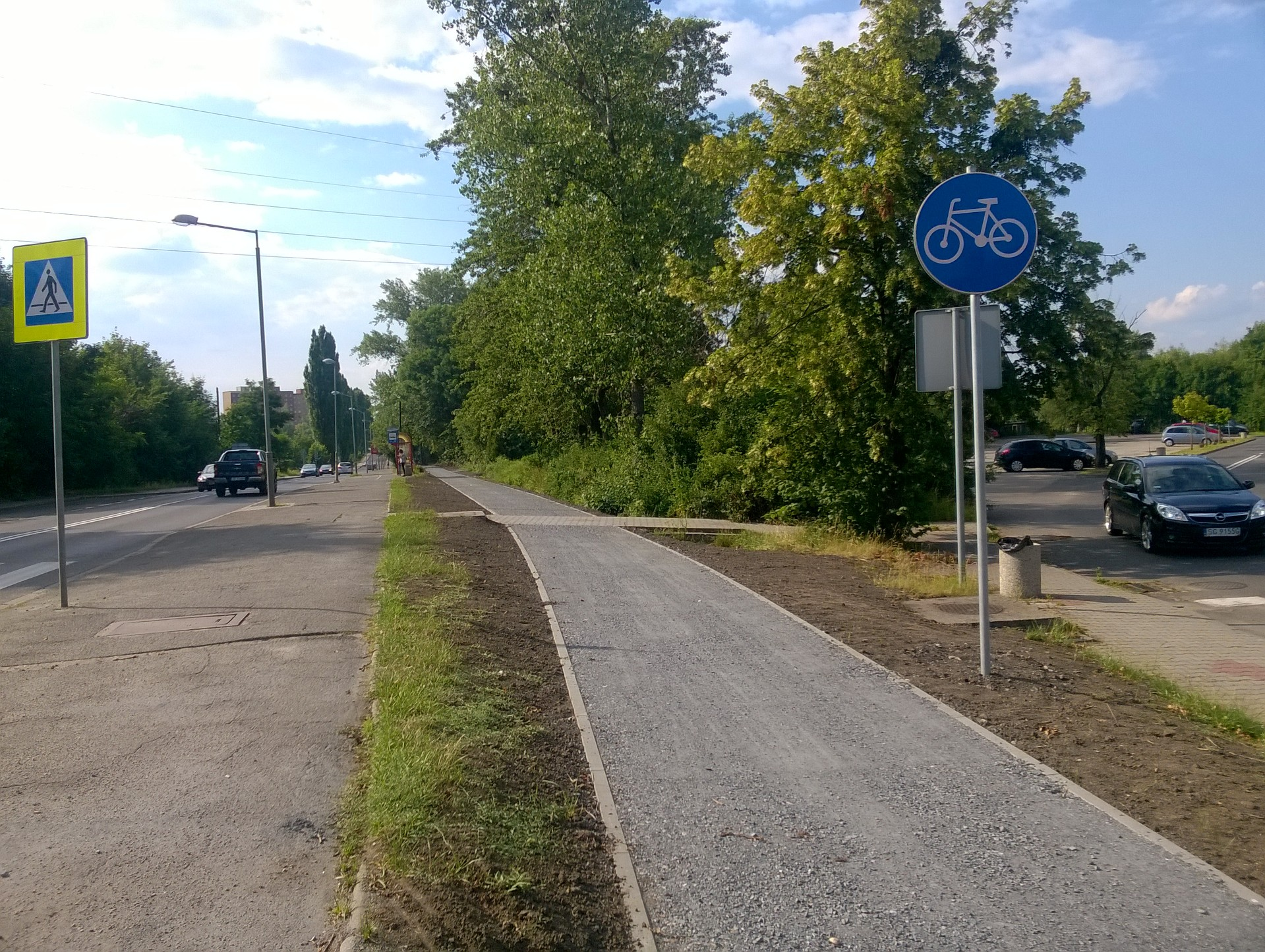 Droga rowerowa wzdłuż ulicy Bojkowskiej w Gliwicach